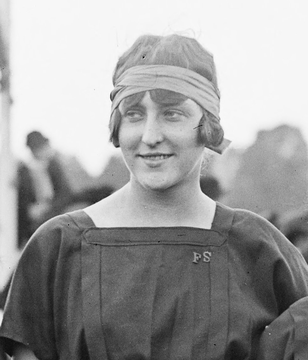 19 sept. 1920, kermesse de Chantilly ; Frédérique Küsel.